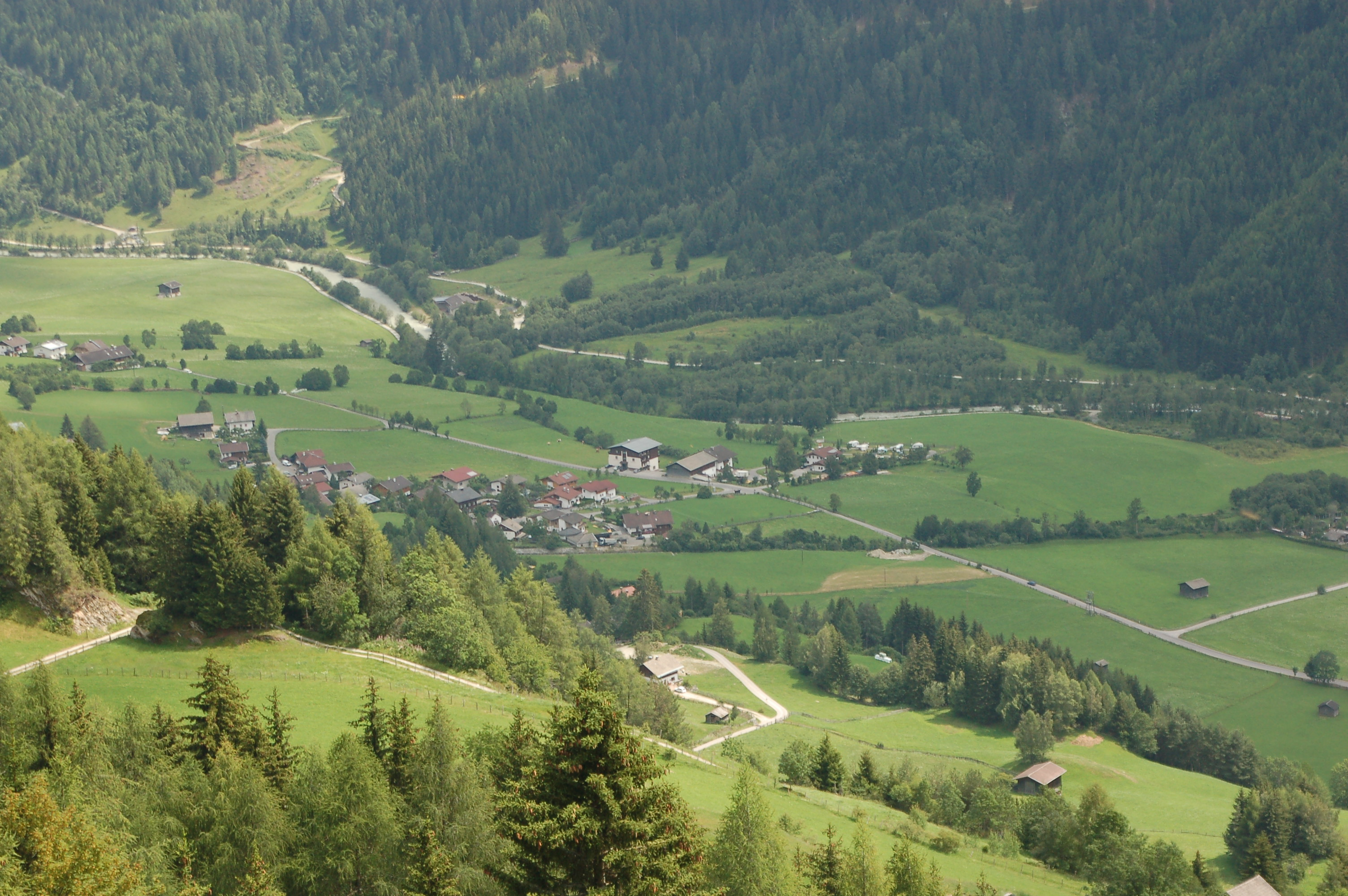 Die Fraktion Niedermauern (Gemeinde Virgen) gesehn von Norden (Hof Budam)